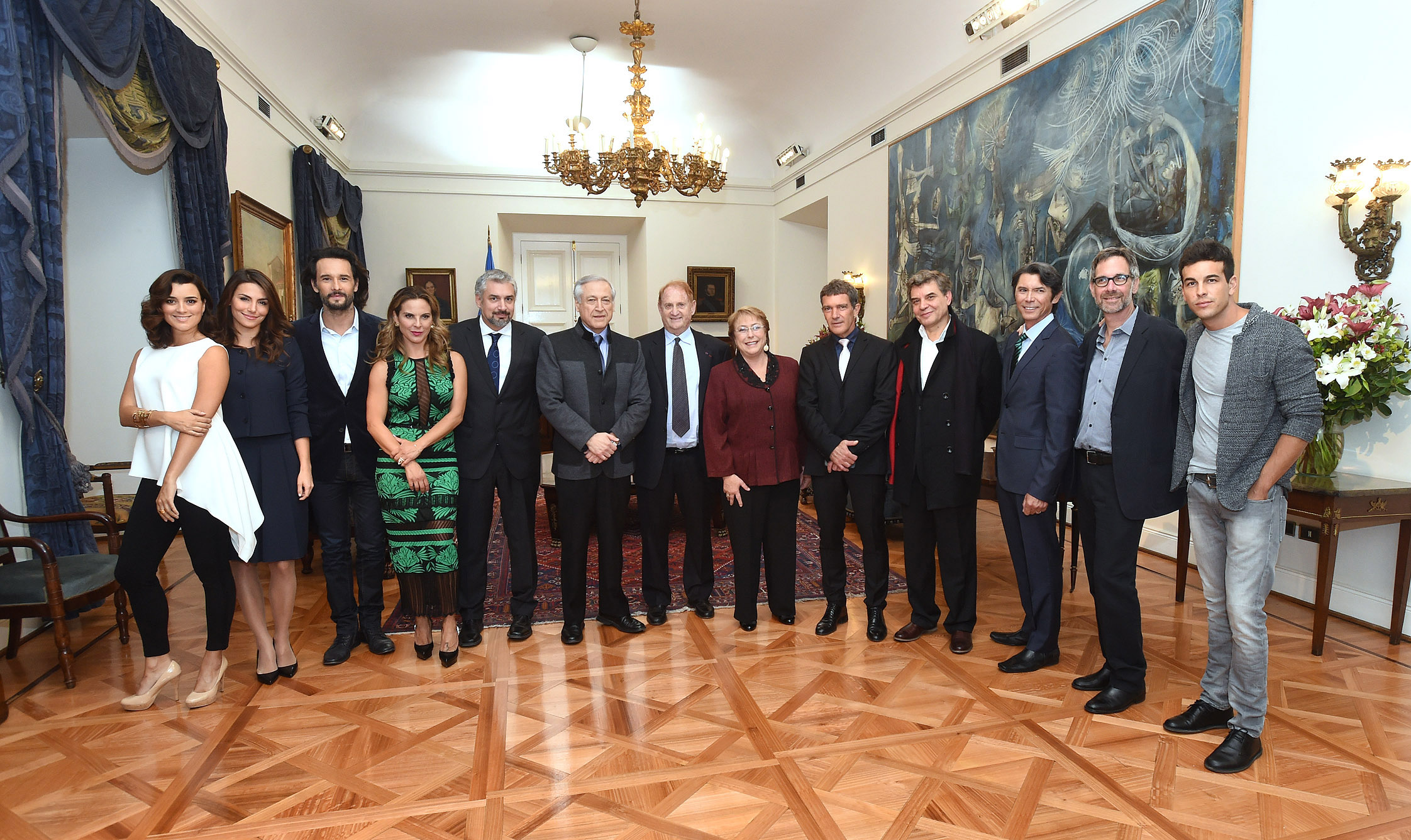 Gobierno de Chile